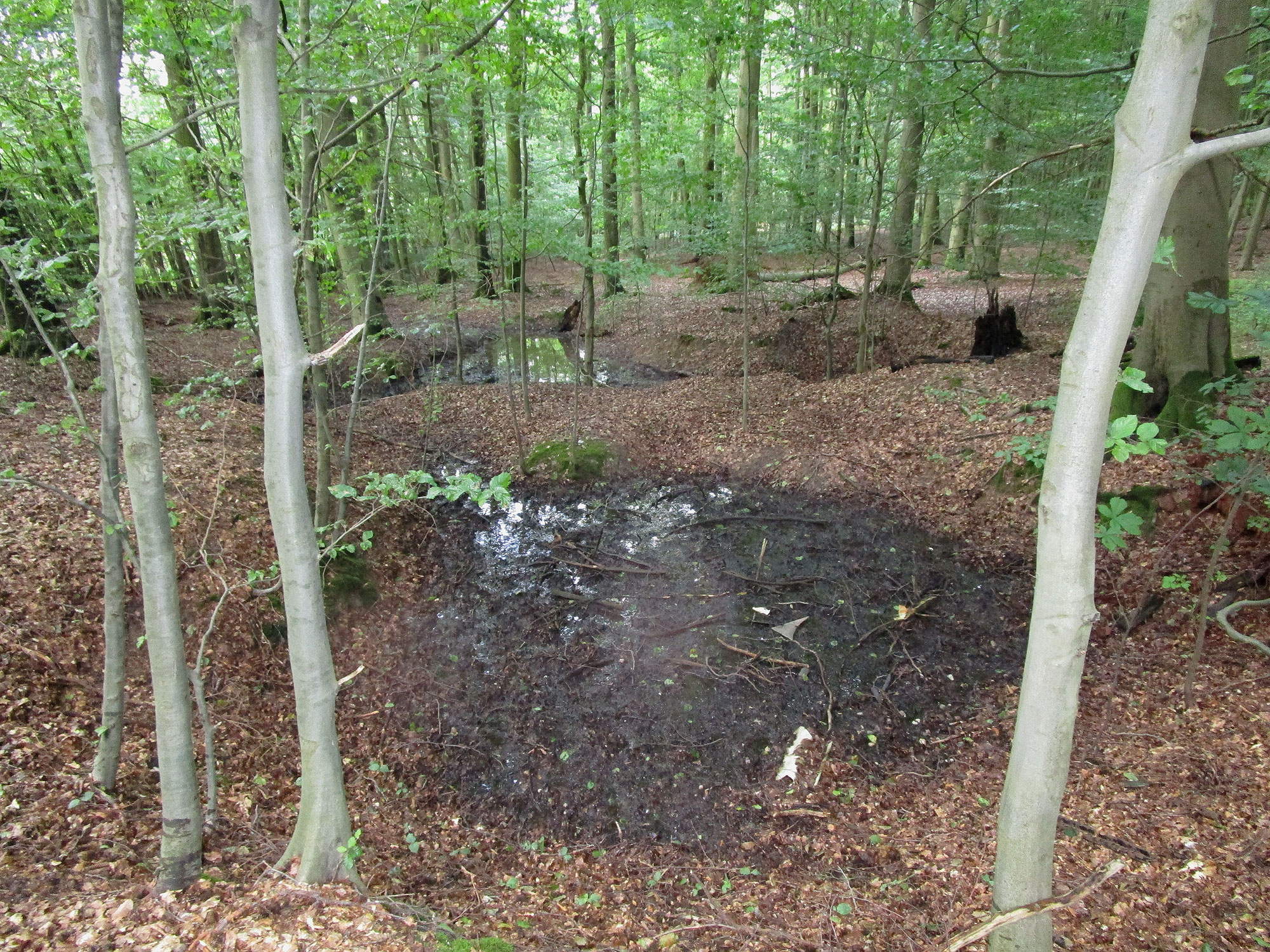 Eine von mehreren Walkerdegruben am Sonnenberg.